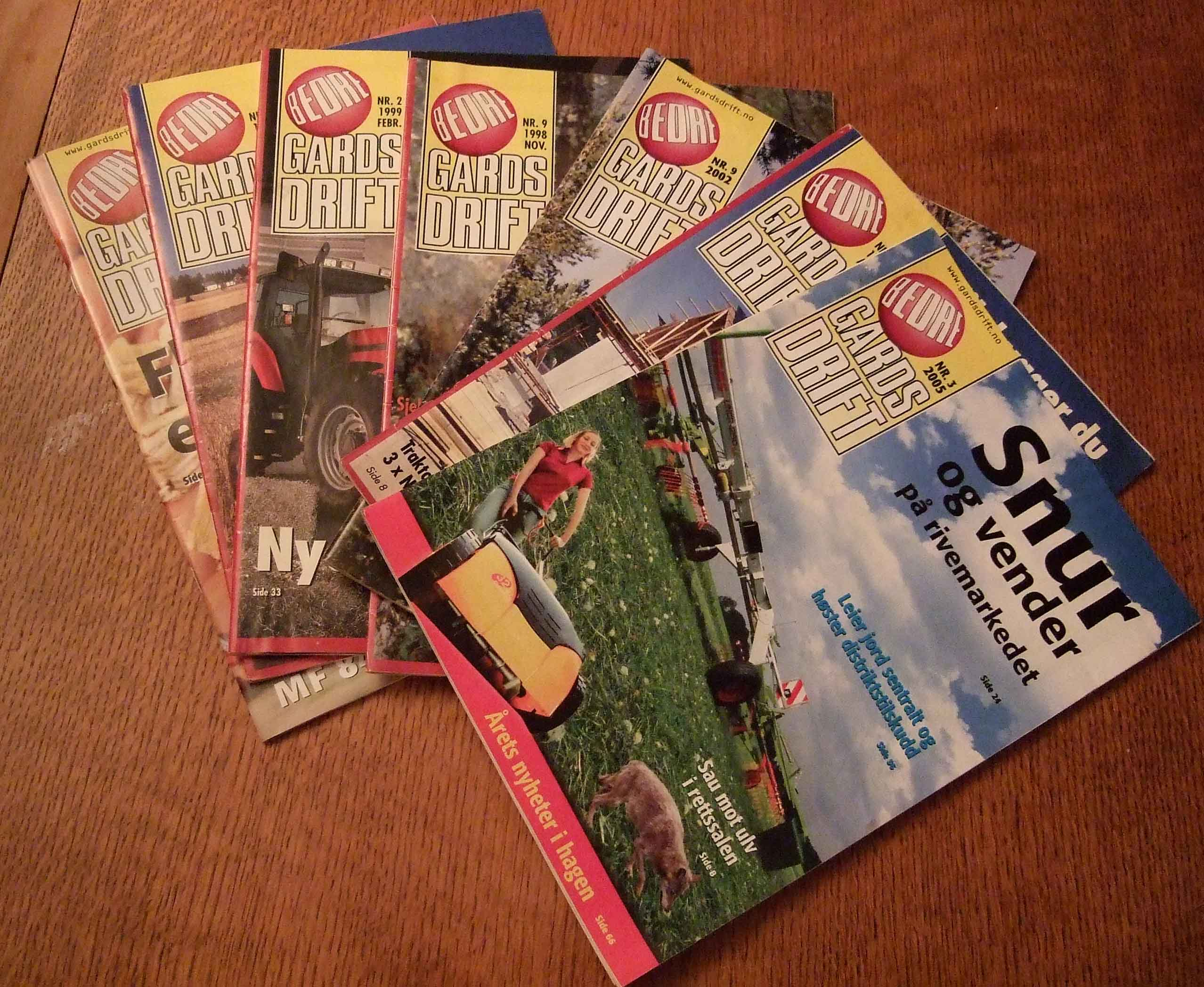 "Bedre gardsdrift"